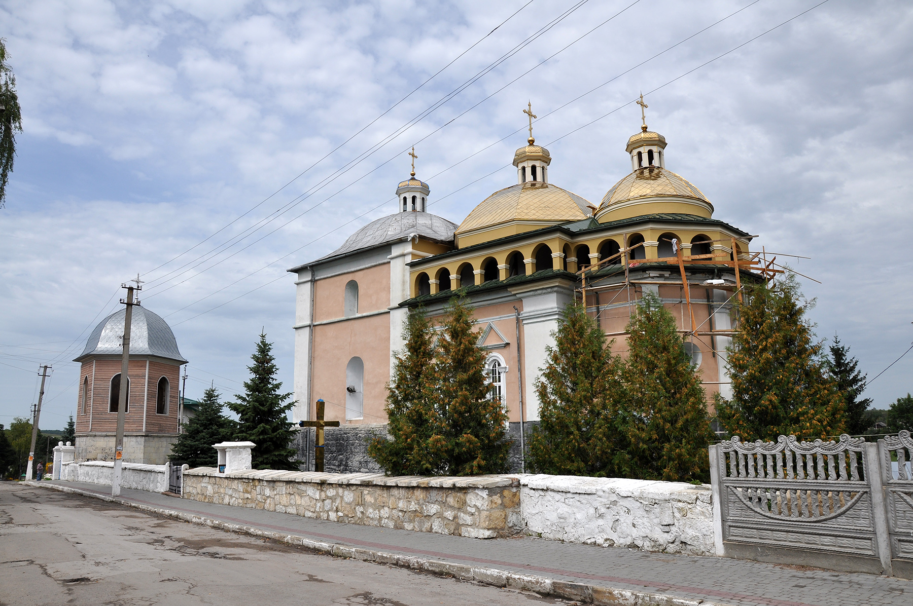 Успенська церква, Підгайці, вул. Бережанська